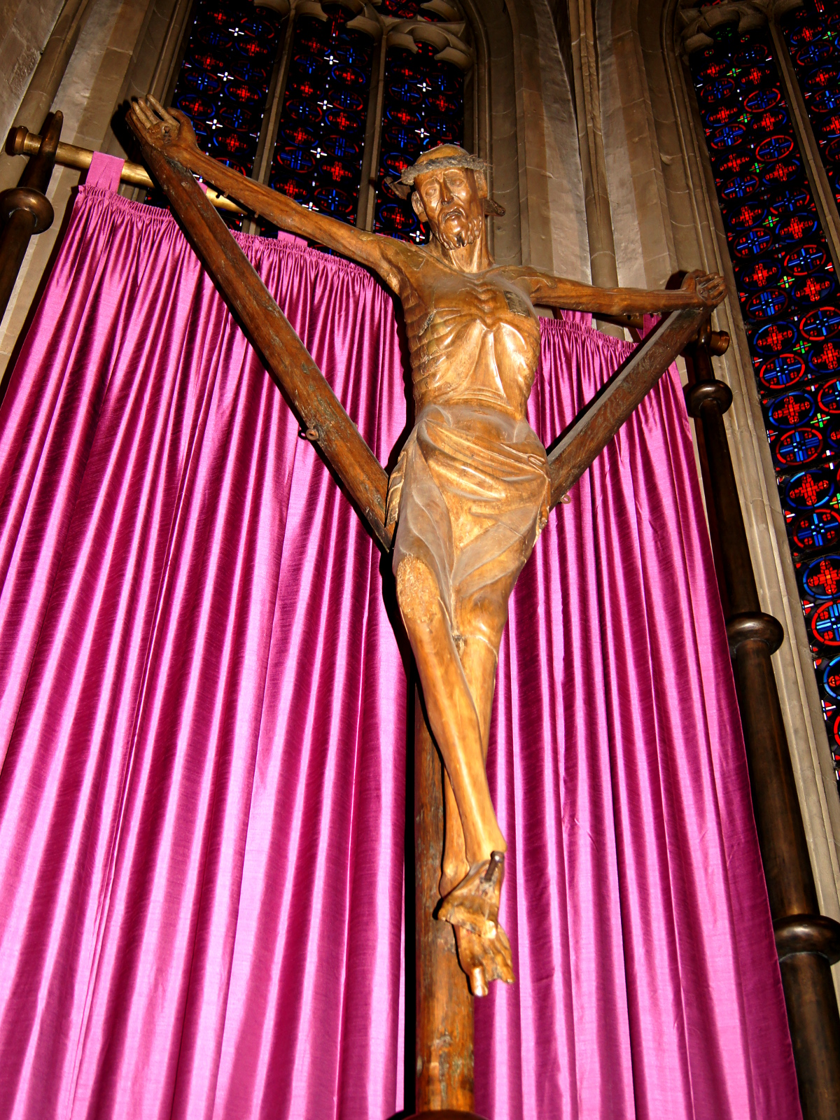 Das Coesfelder Kreuz, ein hölzernes Gabelkreuz aus dem frühen 14. Jahrhundert mit Kreuzreliquie, wird in der Pfarrkirche St. Lamberti in Coesfeld aufbewahrt. Es ist das größte Gabelkreuz Deutschlands und war über Jahrhunderte Anziehungspunkt für Wallfahrer.